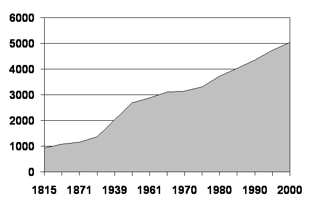 Einwohnerentwicklung von Unkel